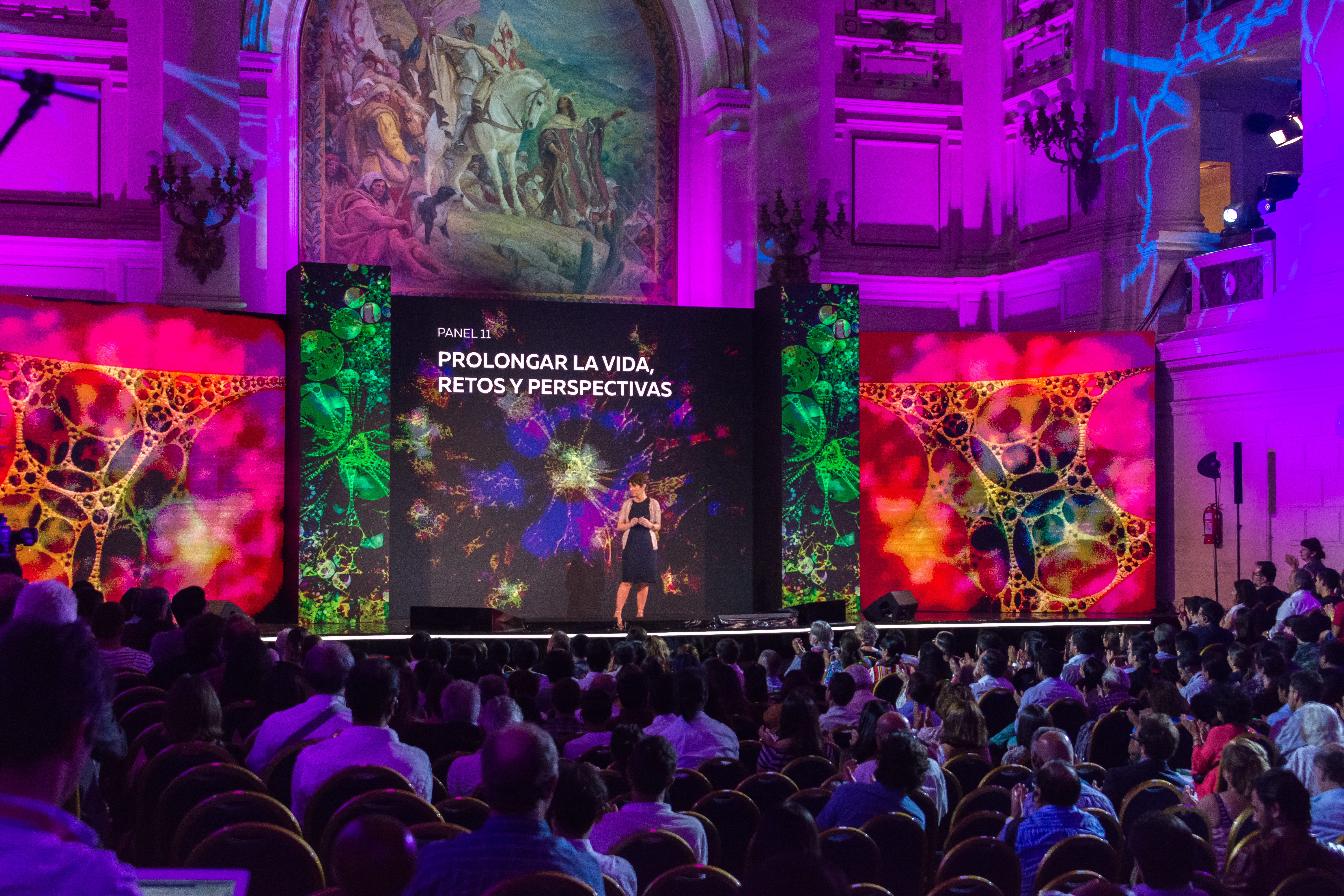 Giovanna Mallucci, Congreso Futuro, Ex Congreso Nacional, Santiago, Región Metropolitana, Santiago.